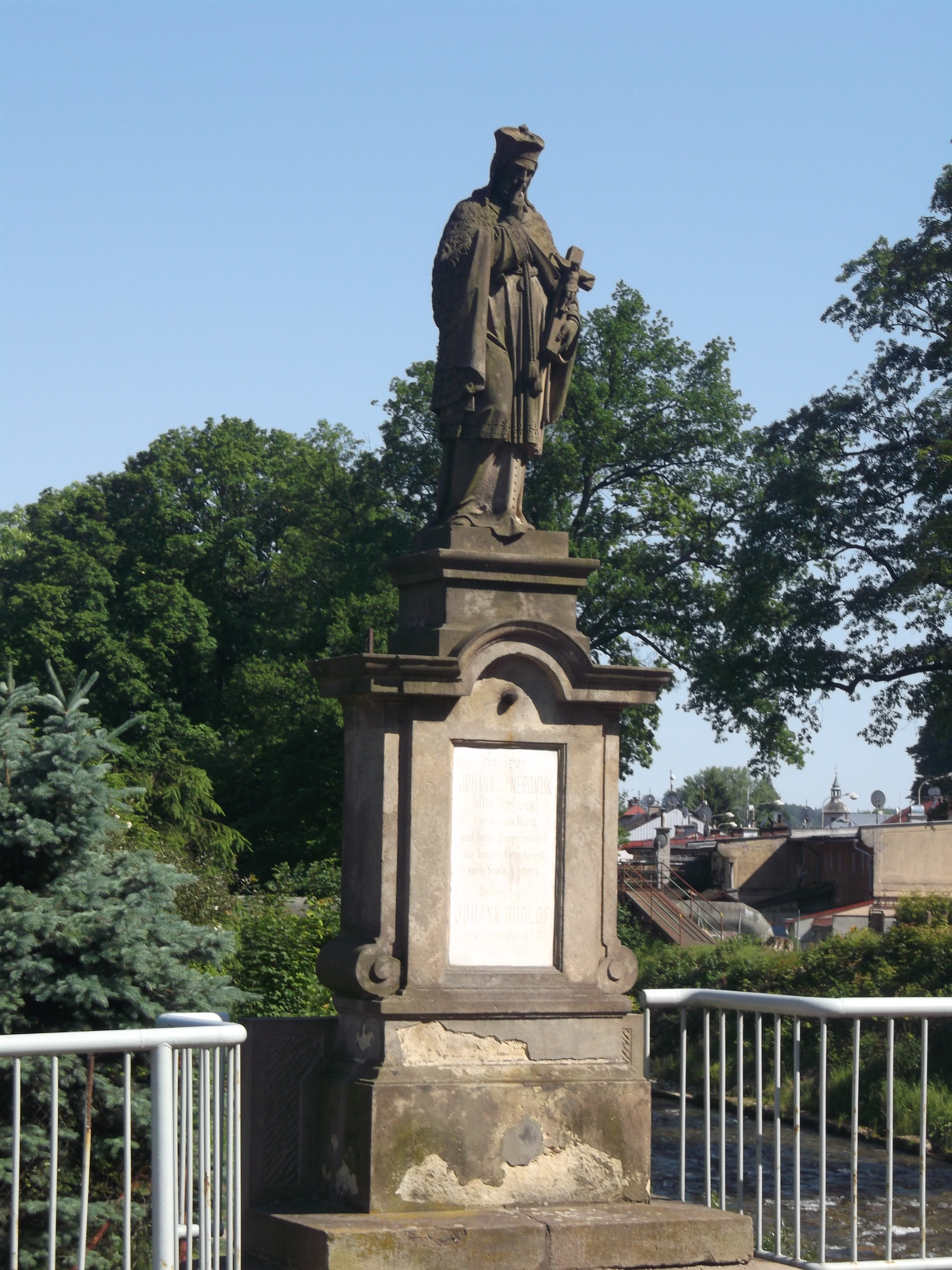 Horní Staré Město - socha sv. Jana Nepomuckého na Staroměstském mostě.